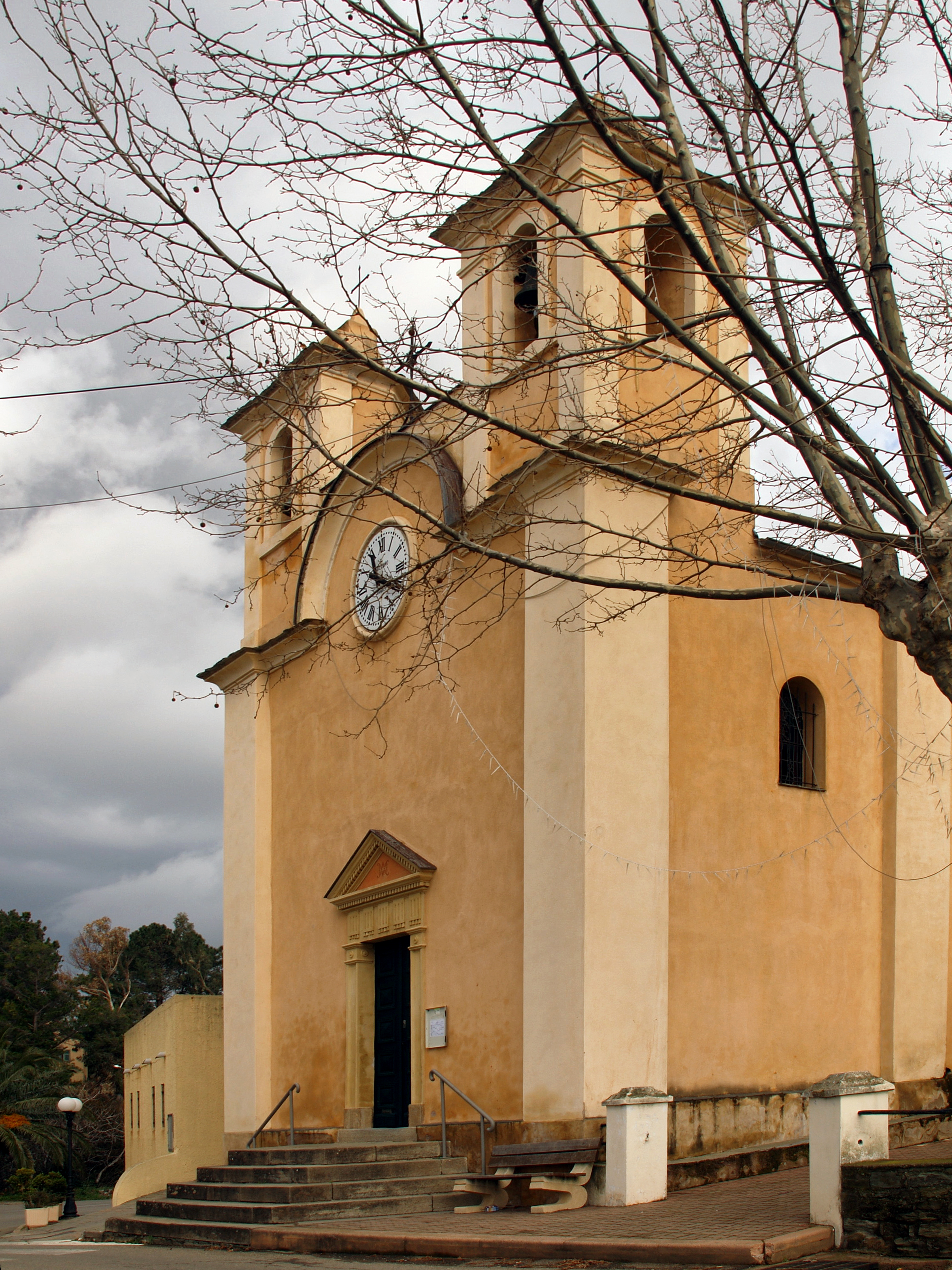 Olmeta-di-Tuda, Nebbio (Haute-Corse) - L'église paroissiale Sainte-Marie-de-l'Assomption dite "Santa Maria"